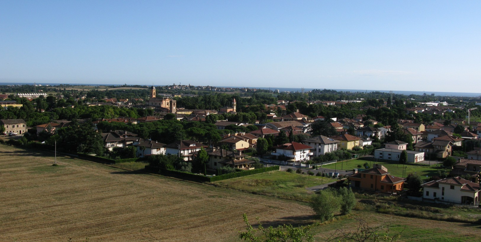 Panorama di San Giovanni in Marignano.